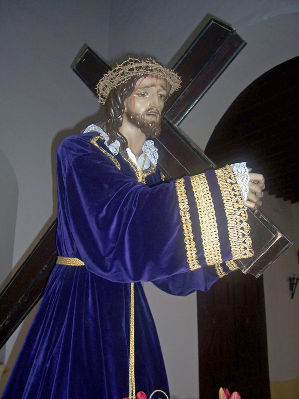 Jesús Nazareno realizado por Antonio Cano en el año 1940 para la iglesia de Torrox( Málaga).